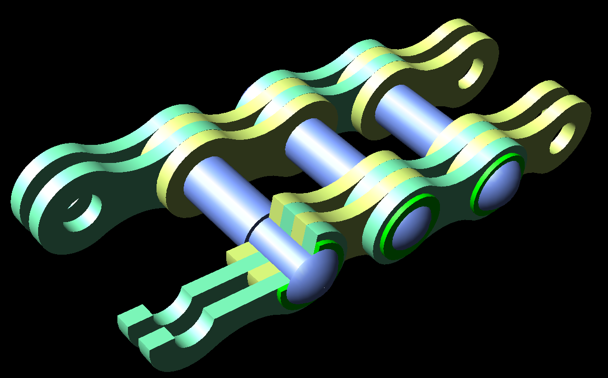 Csapos hajtólánc